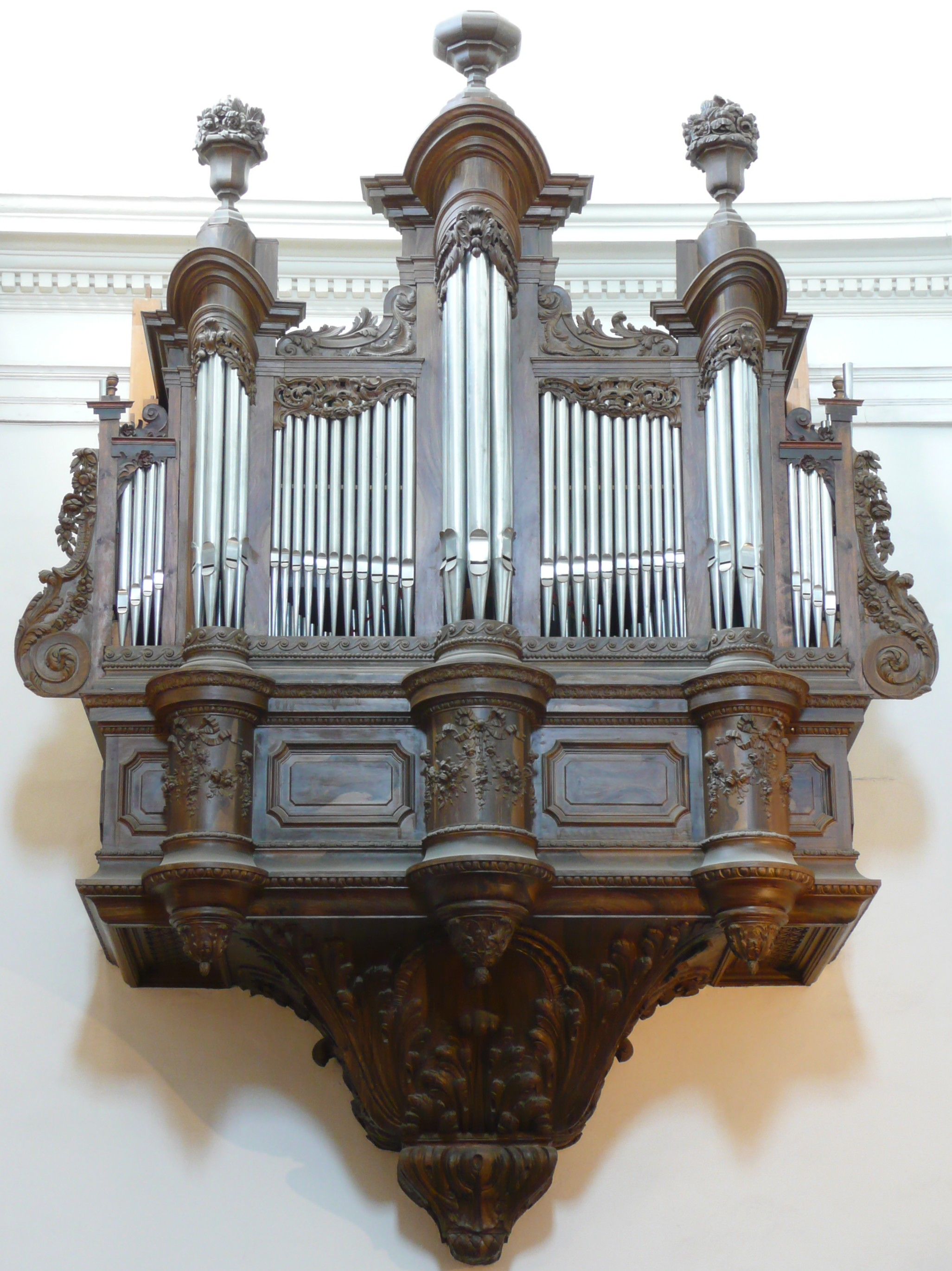 A Nîmes (Gard, France), dans le Petit Temple sis 19 rue du Grand Couvent, buffet d'orgue en noyer du frère convers dominicain Jean-Esprit Isnard vers 1750, contenant un orgue de Carl Theodor Kuhn de 1890, très remanié en 1956 par Maurice Puget, et encore modifié en 1964 par Léopold Trosseille.